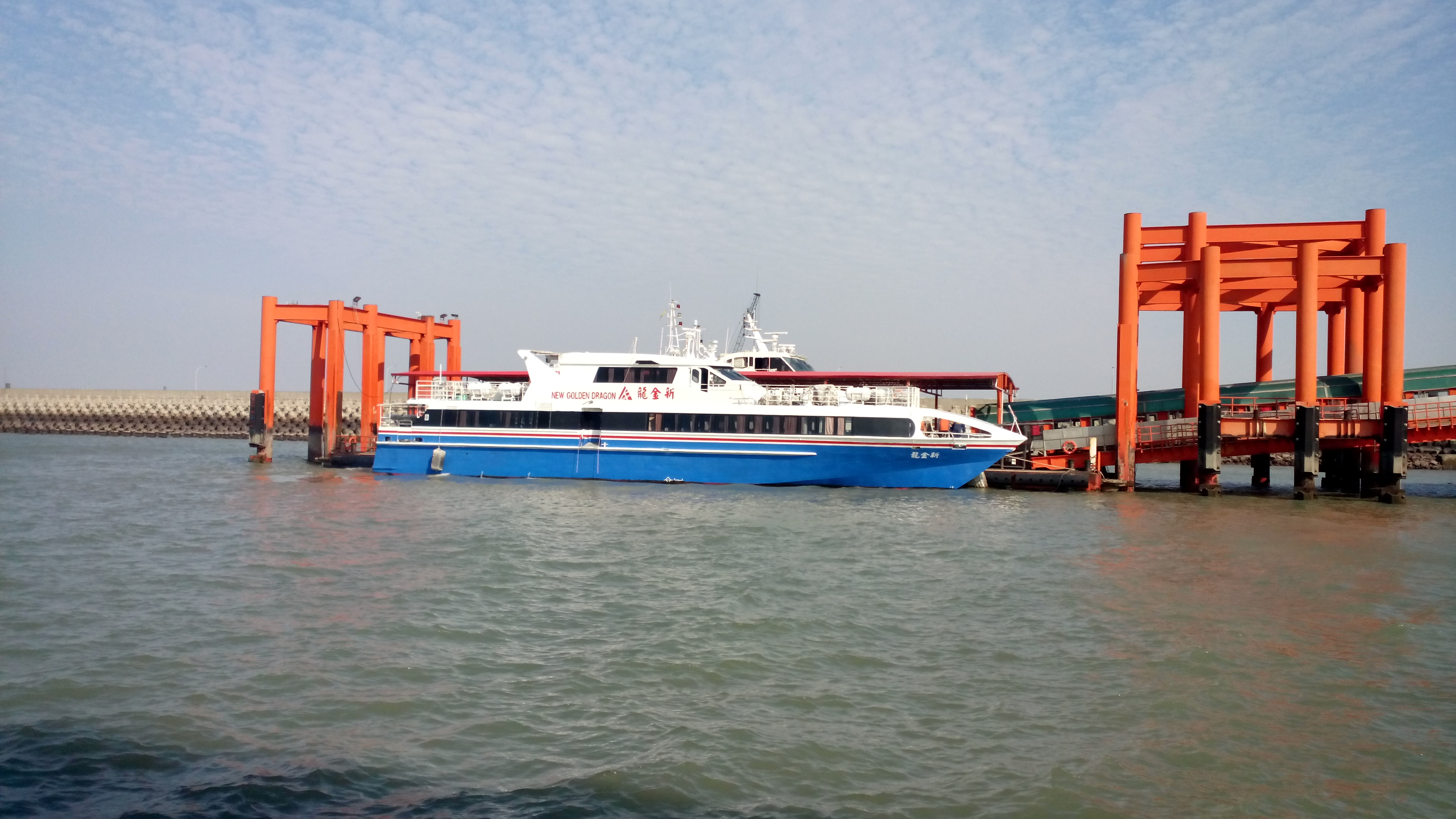 客運作業用碼頭